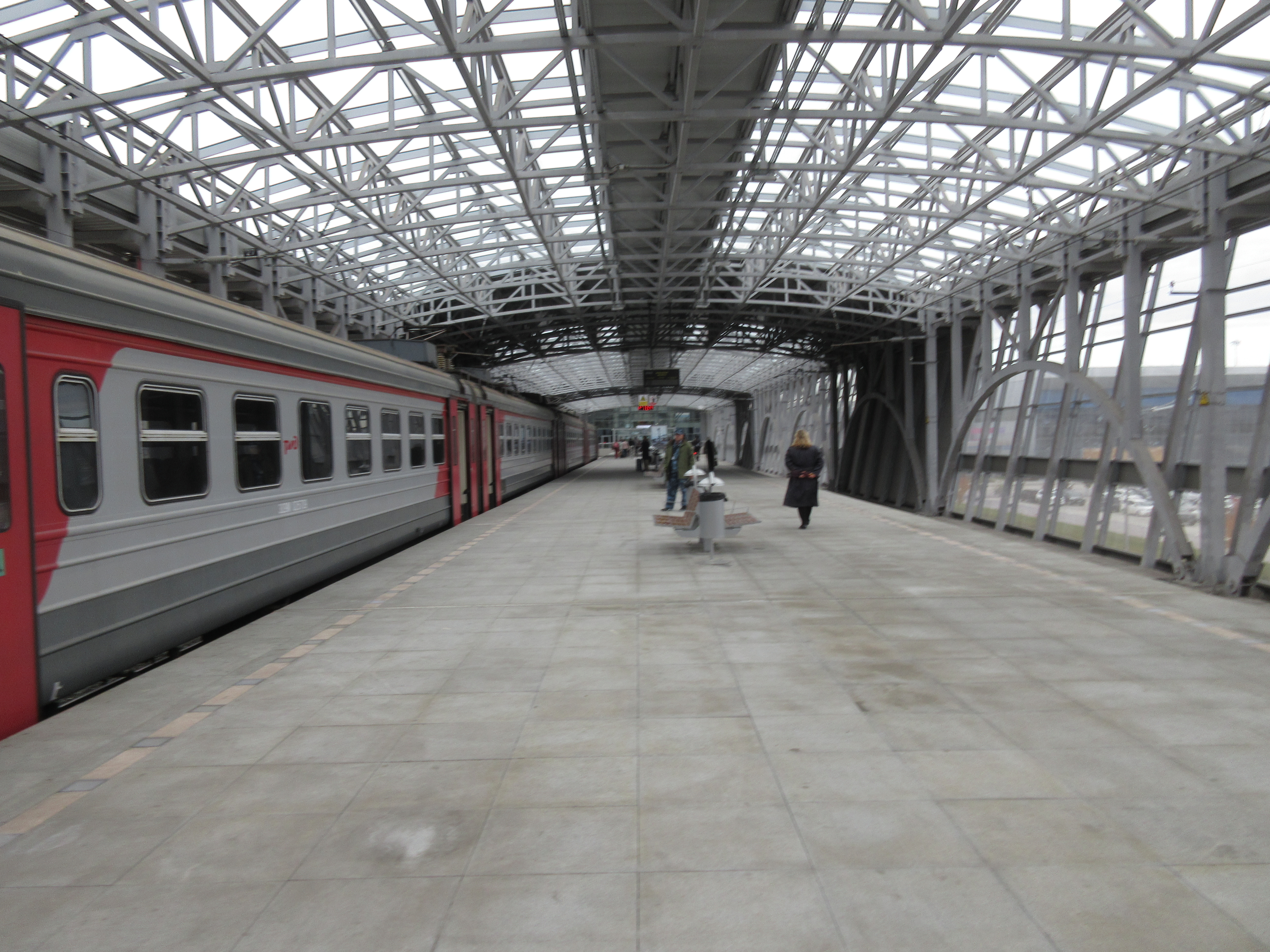 クネヴィッチ駅のプラットホーム